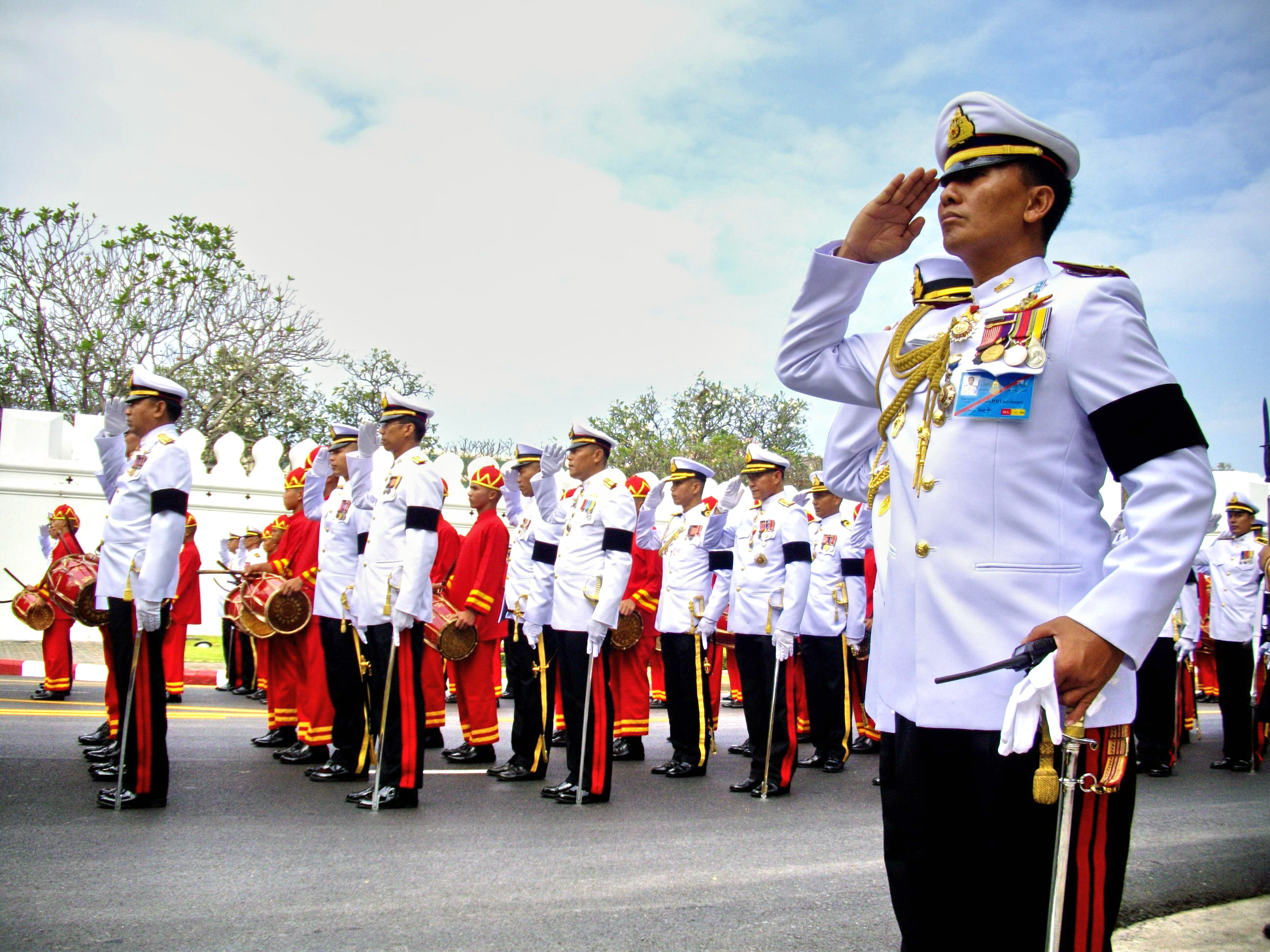 นายทหารราชองครักษ์ที่กำกับริ้วขบวนทำวันยาหัตถ์ ถวายความเคารพพระโกศพระศพสมเด็จพระเจ้าพี่นางเธอ เจ้าฟ้ากัลยาณิวัฒนา กรมหลวงนราธิวาสราชนครินทร์ ก่อนเริ่มเคลื่อนริ้วกระบวนพระมหาพิชัยราชรถ